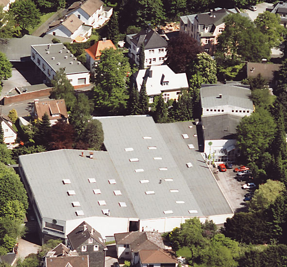 KUKKO-Stammwerk in Remscheid